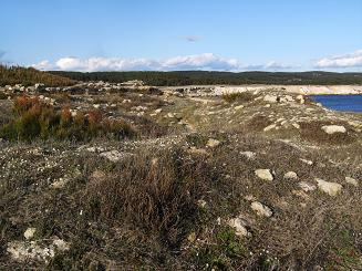 Photographie du site archéologique de l'Arquet (Martigues, 13). La photo a été prise selon l'axe nord-sud en direction du nord. Elle montre approximativement le centre et la partie nord du site.